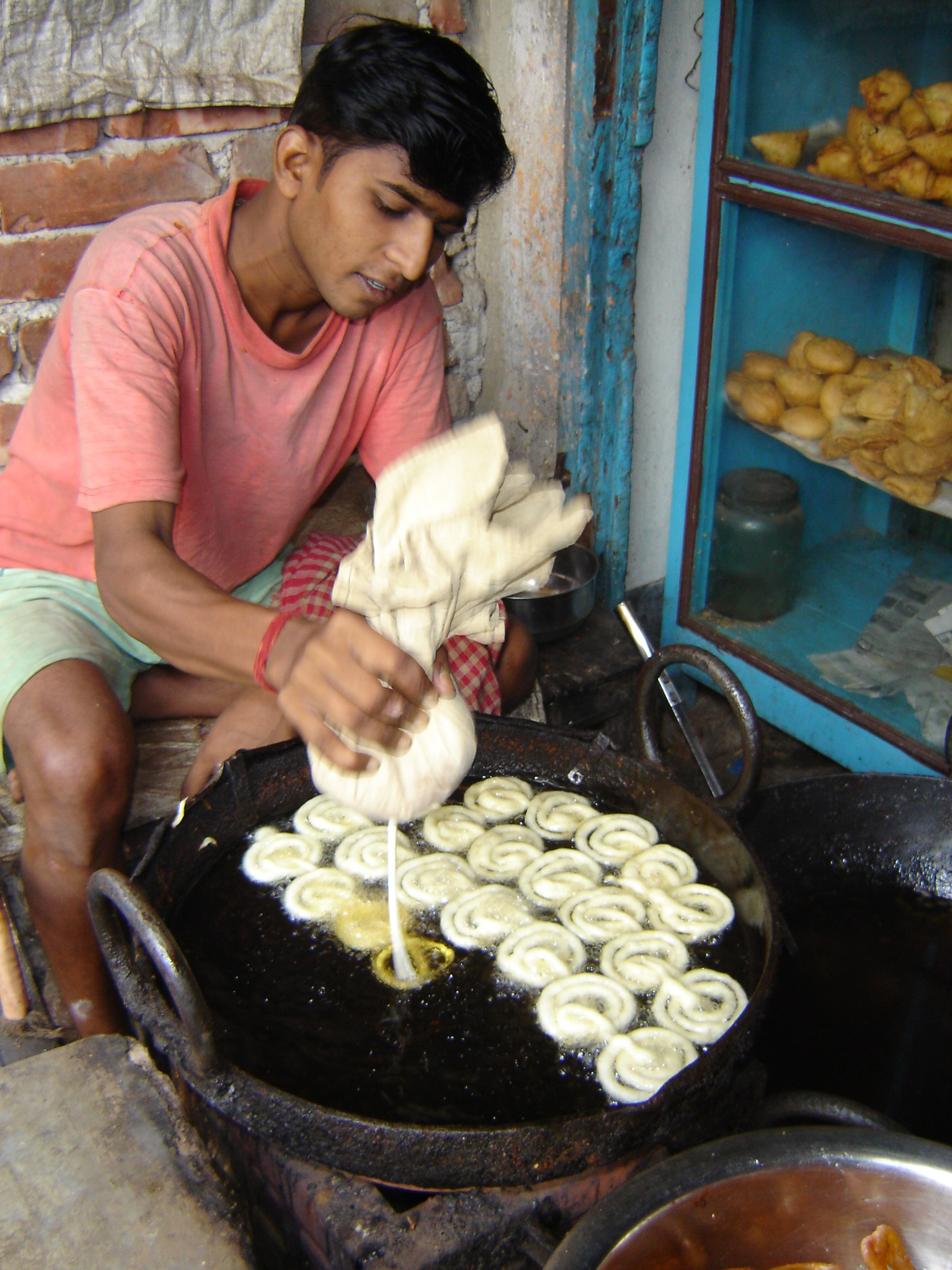 Deep frying Jalebi.